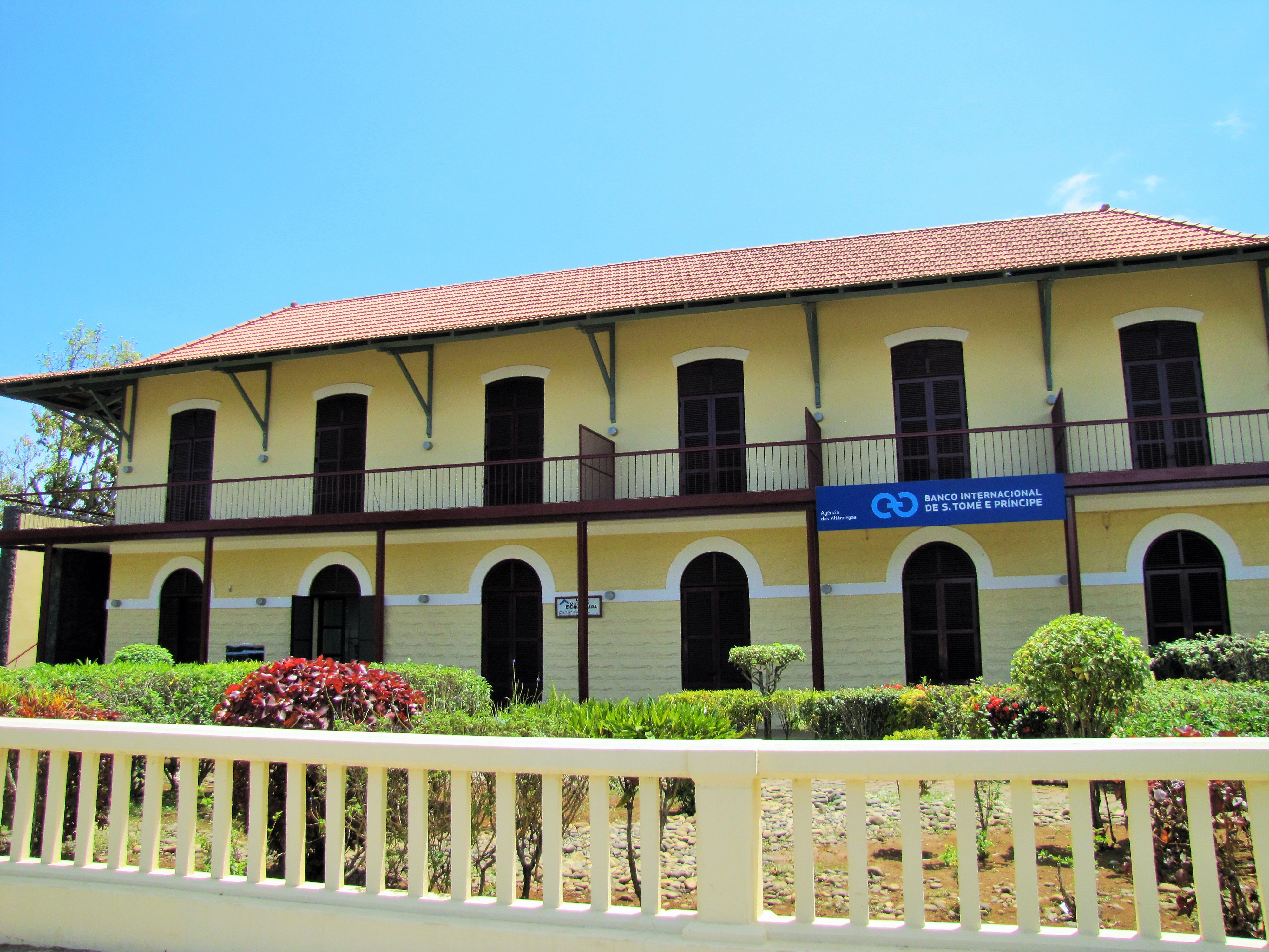 Edifício da Santa Casa da Misericórdia de São Tomé / Banco Internacional de São Tomé e Príncipe. IPA.00033347. São Tomé e Príncipe, Ilha São Tomé, Água Grande, Água Grande